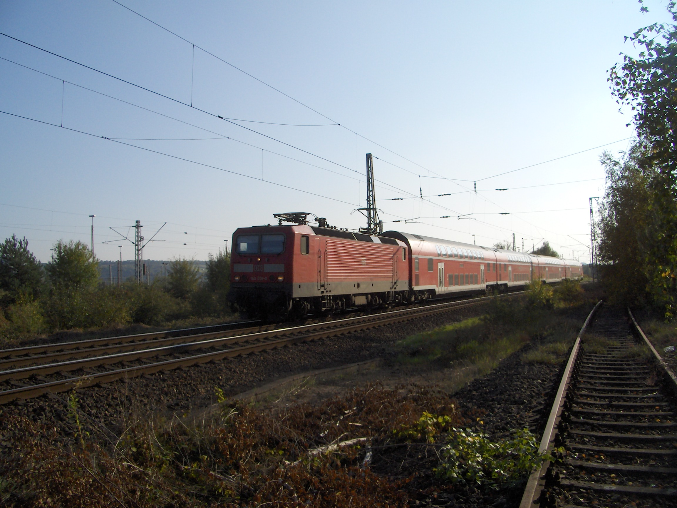 143 031 mit dem aus Doppelstock-Wagen gebildeten Region Regionalexpress RE 12015 Saarbrücken-Koblenz bei Trier-Ehrang am 12. Okotober 2005. Rechts im Bild ist das stillgelegte Gleis der ehemaligen KBS 627 Ehrang-Igel. Auf der anderen Seite des Bahndammes befindet sich der Verschiebebahnhof Ehrang.